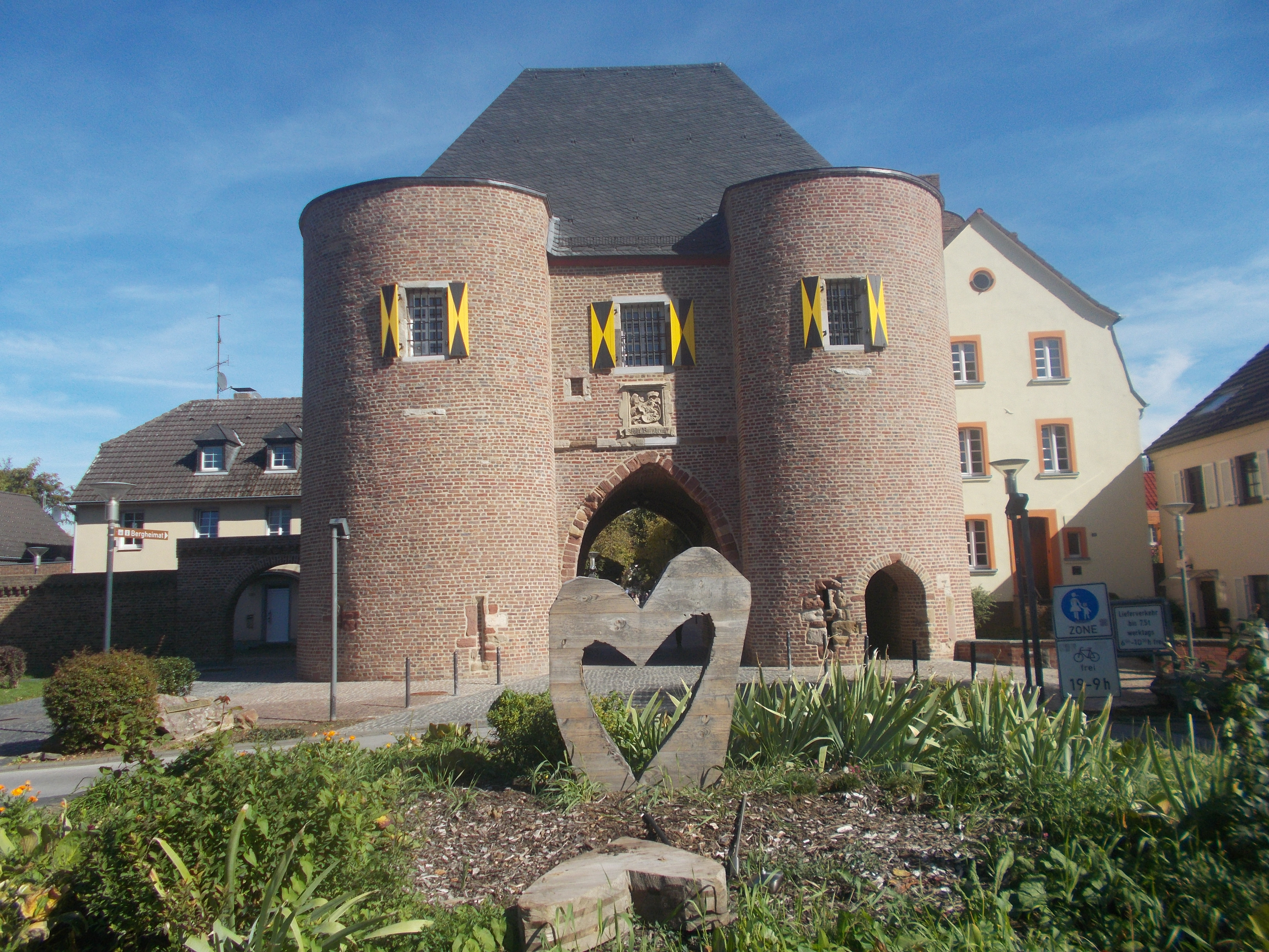 Das Aachener Tor entstand Anfang des 14. Jahrhunderts in Zusammenhang mit der Stadtwerdung und Stadtbefestigung Bergheims. Es schützte die Fernhandelsstraße Köln–Aachen. Das Aachener Tor gehört mit seinem zentralen zweigeschossigen Rechteckbau und dreiviertelrunden Türmen an den Außenecken zu den mächtigsten Stadttoren des Rheinlandes. Es diente im Mittelalter als Behausung des Pförtners, ab dem Jahre 1503 als Wohnung des Amtmannes, im 19. Jahrhundert als Gefängnis, später als Kreisheimatmuseum.